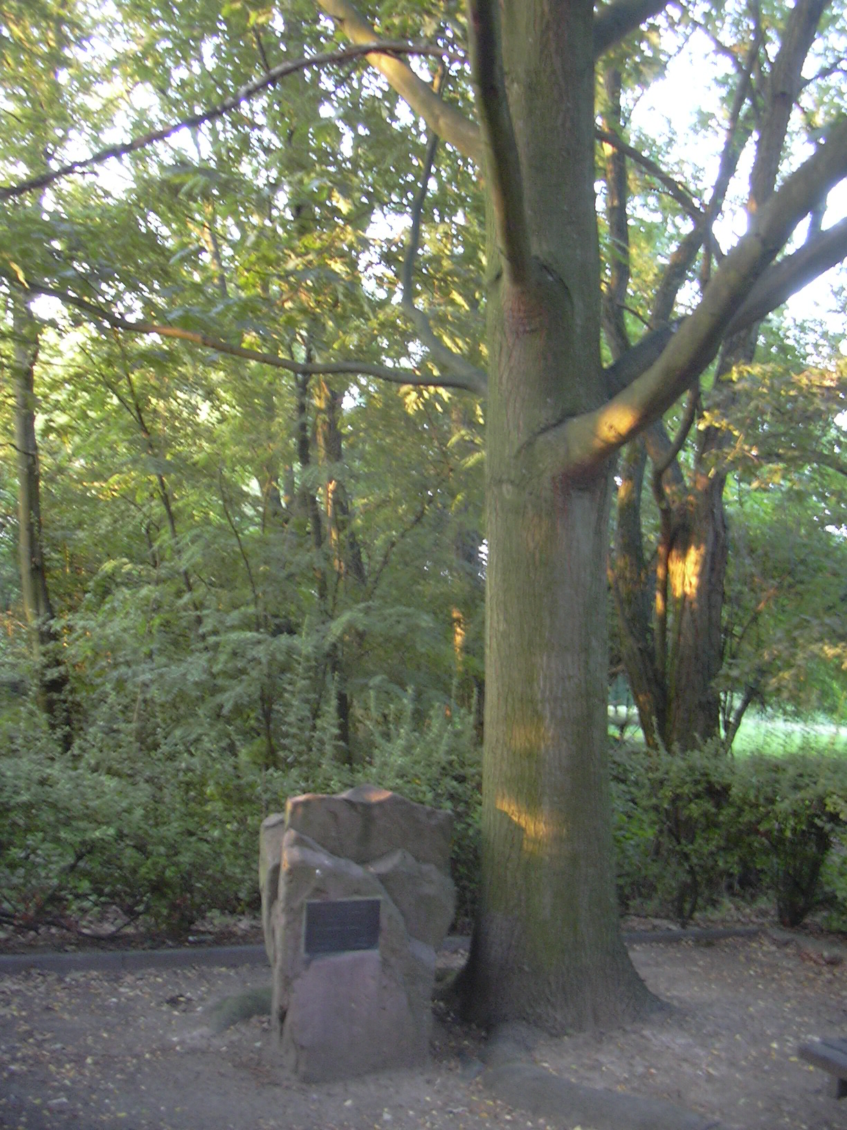 "witch oak" monument at Großkrotzenburg, near Aschaffenburg, Bavaria/Germany